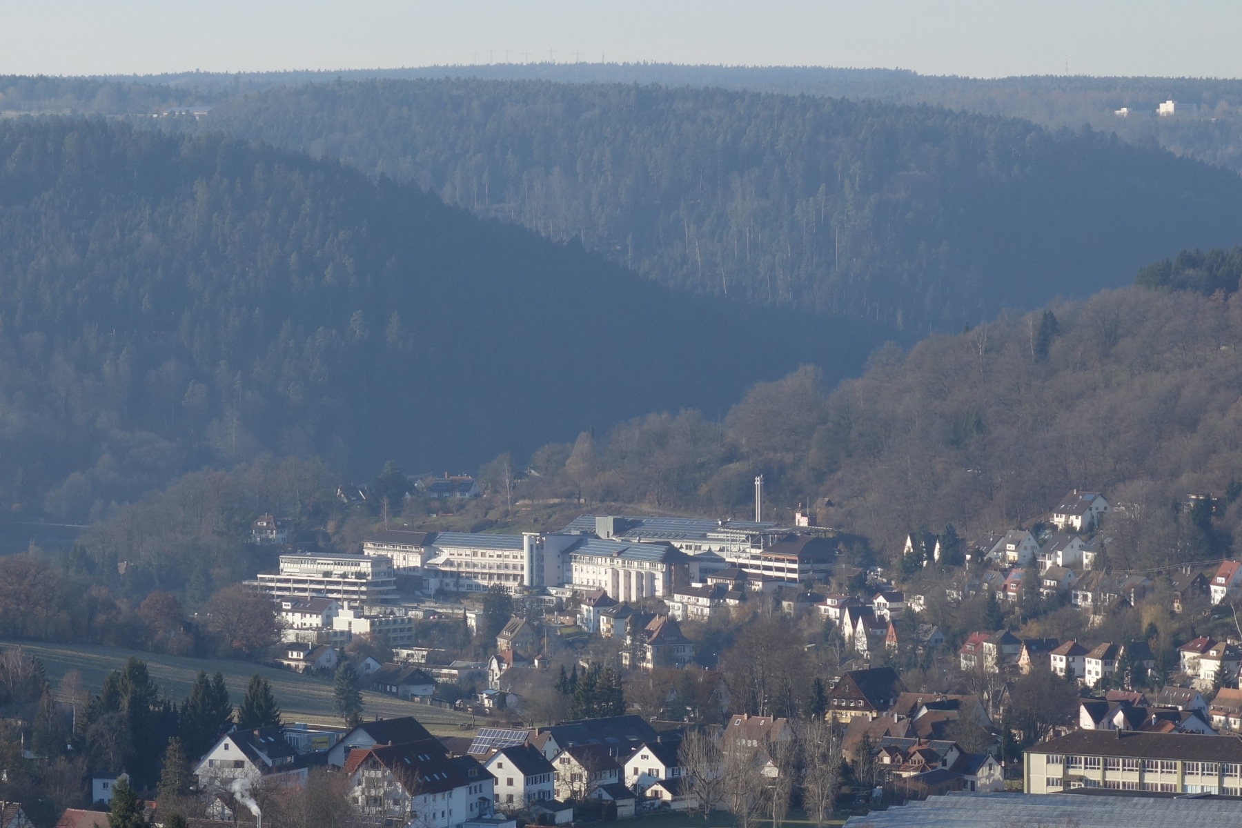 Blick auf das Kreiskrankenhaus Calw, im Spätwinter 2018 vom Galgenberg aus.